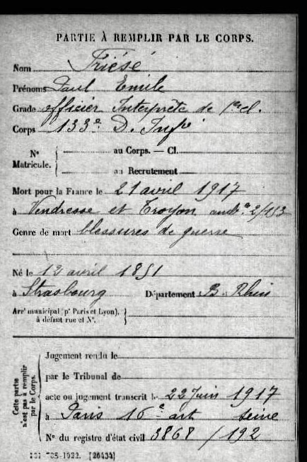 Transcription de l'acte de décès de Paul Friesé du 22 juin 1917